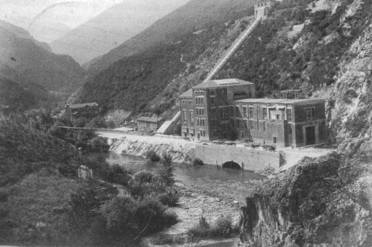 ВЕЦ Въча малко след завършването си